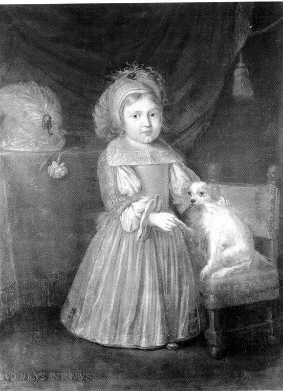 Portrait of Ludwig Anton von Pfalz-Neuburg (1660-1694)